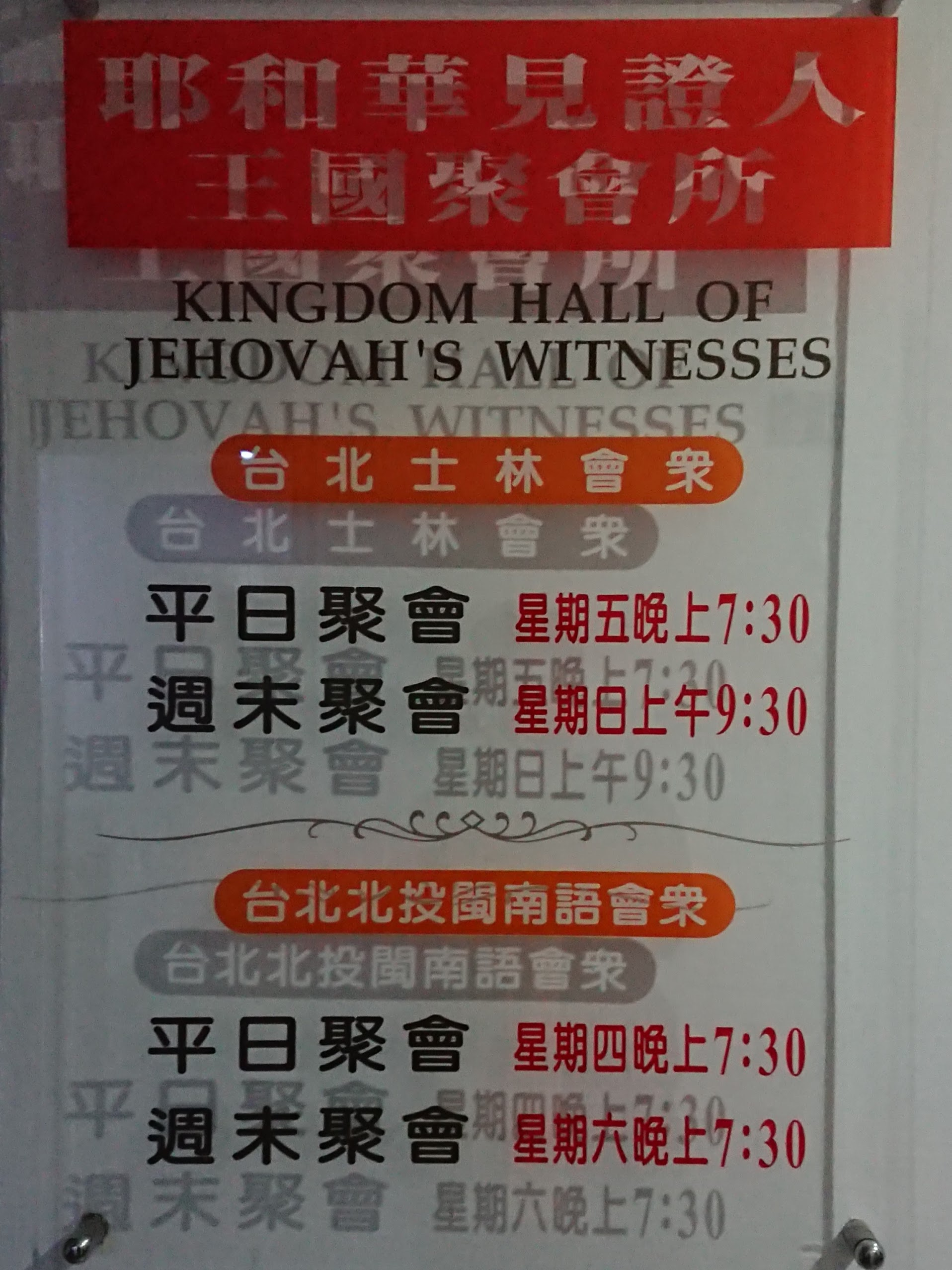 臺北市北投區石牌路一段71巷6號3樓之4，耶和華見證人王國聚會所台北士林會眾門口之聚會時間標示牌。